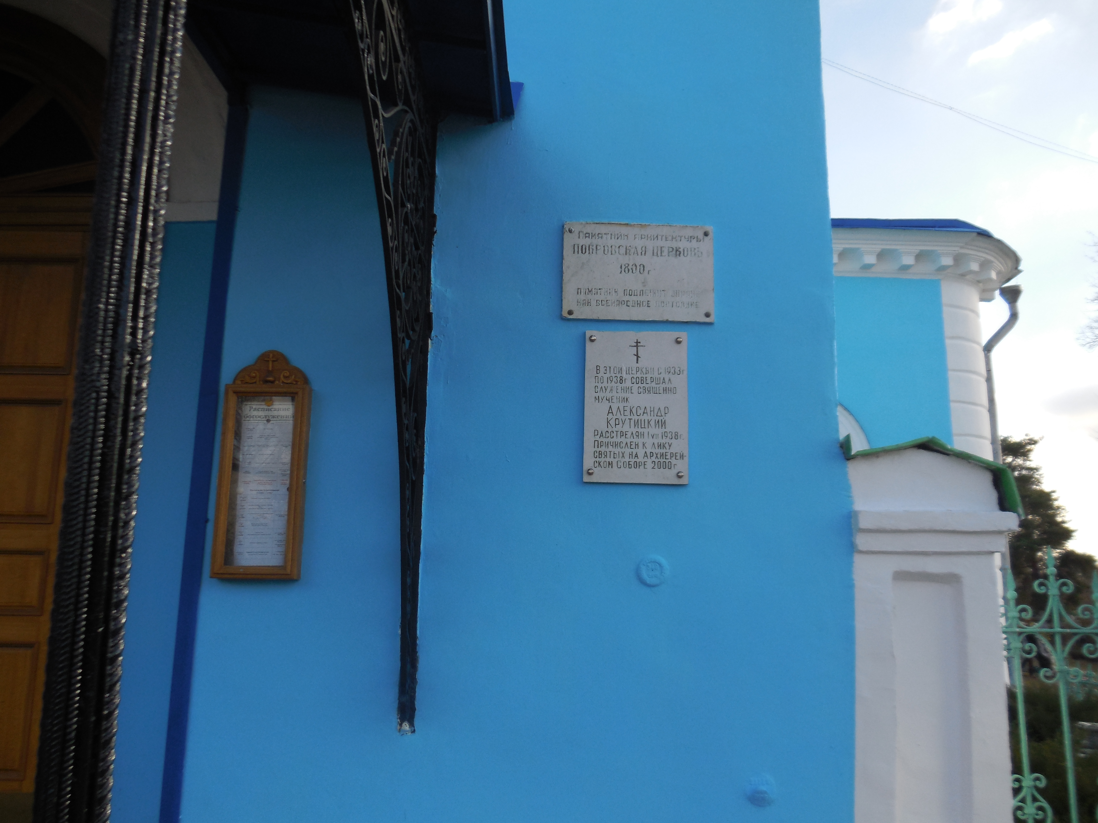 Церковь Покрова Пресвятой Богородицы: улица Широкая, (бывш. село Хомутово), Щёлково, Щёлковский район, Московская область